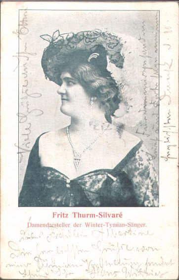 Postkarte Fritz Thurm-Silvaré als Damendarsteller der Winter-Tymian-Sänger (Emil Winter-Tymian, Volkssänger und Humorist in Dresden)